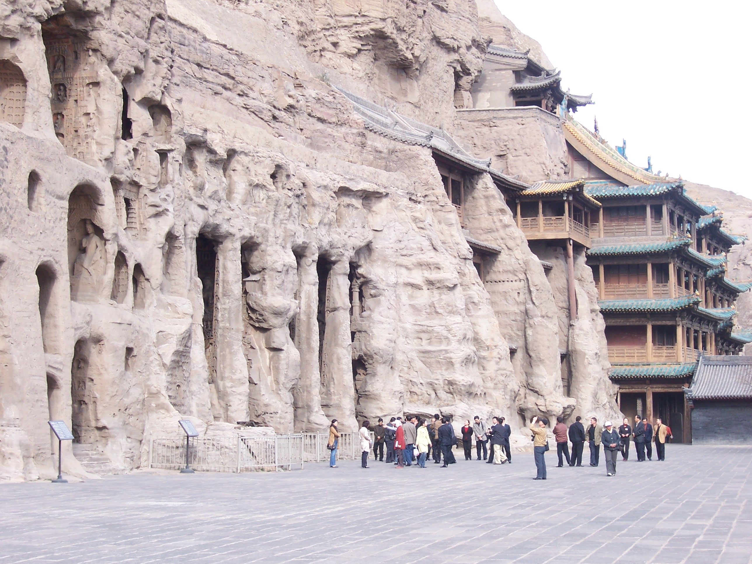 China - Yungang Grottoes 9